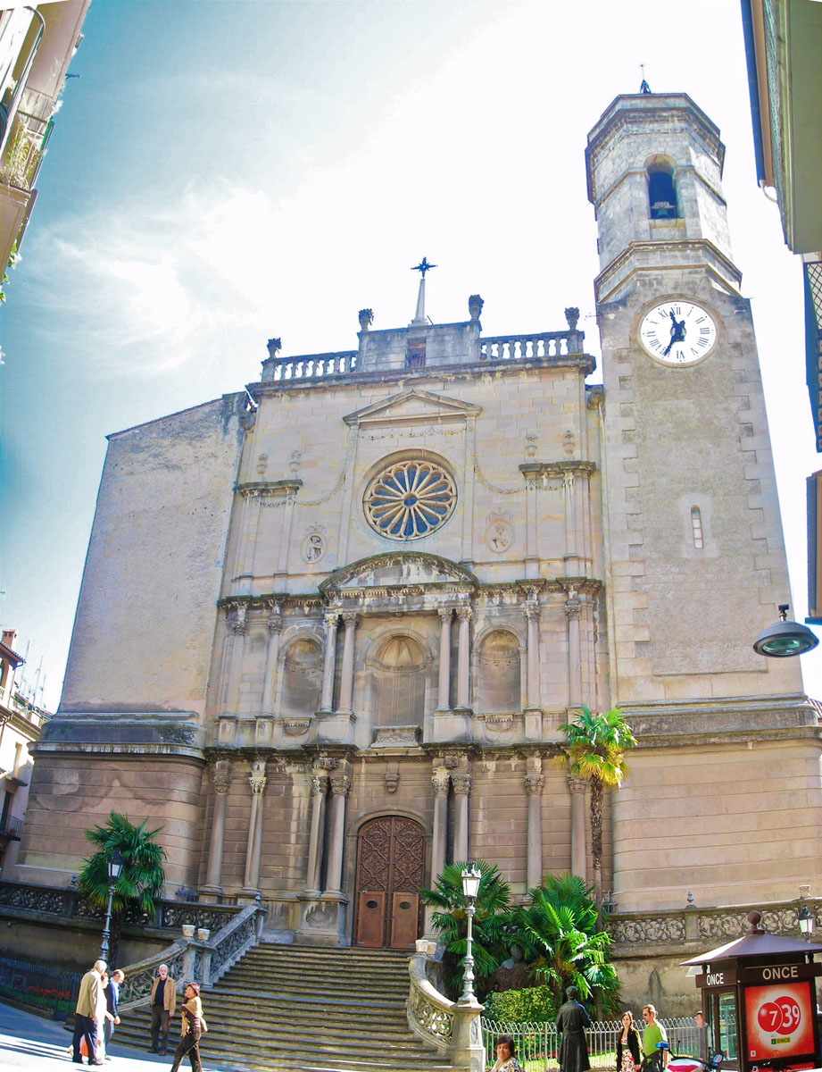 Església de Sant Esteve d'Olot